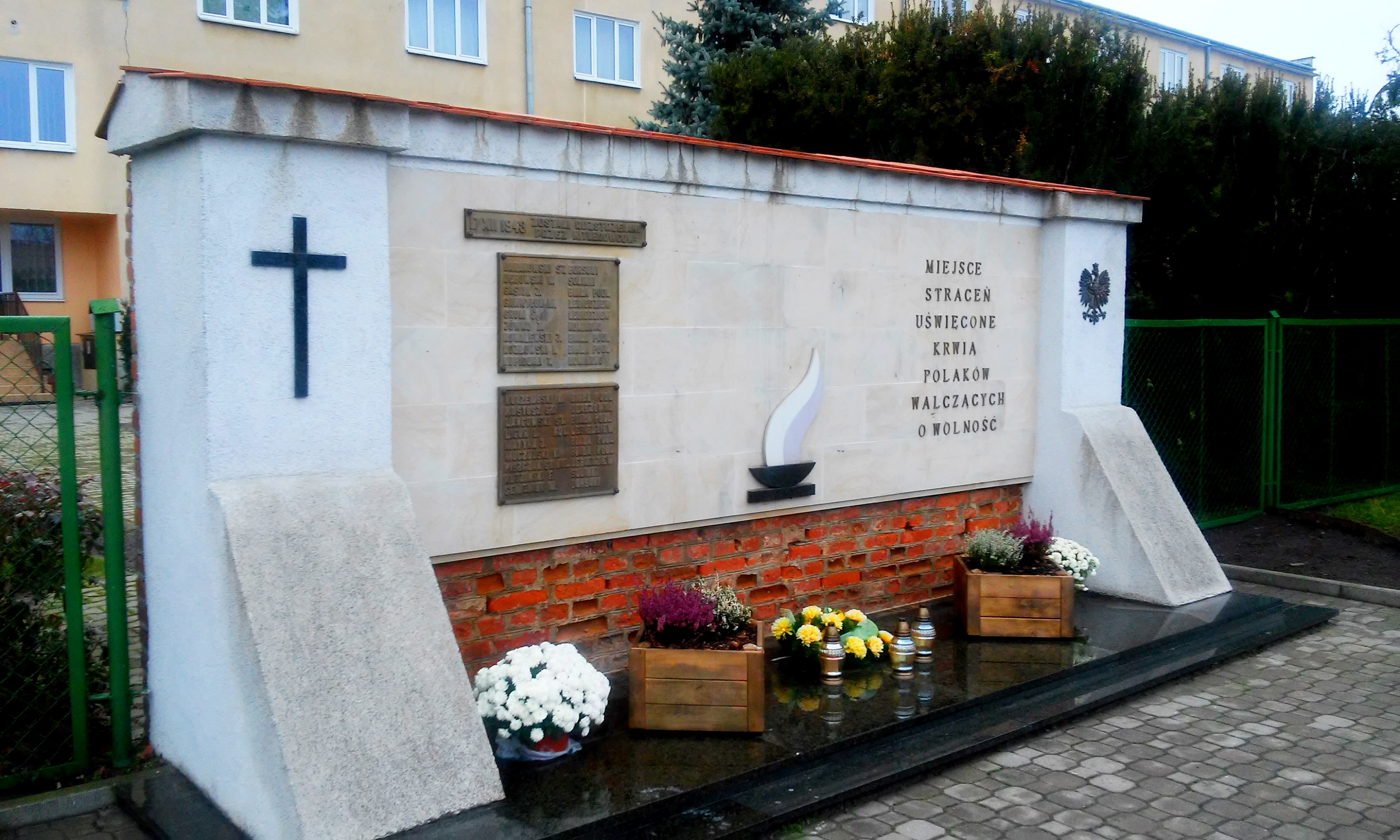 Pomnik na miejscu egzekucji dokonywanych na Polakach przez hitlerowców przed budynkiem szkół w Leśnej Podlaskiej, ul. Bialska.